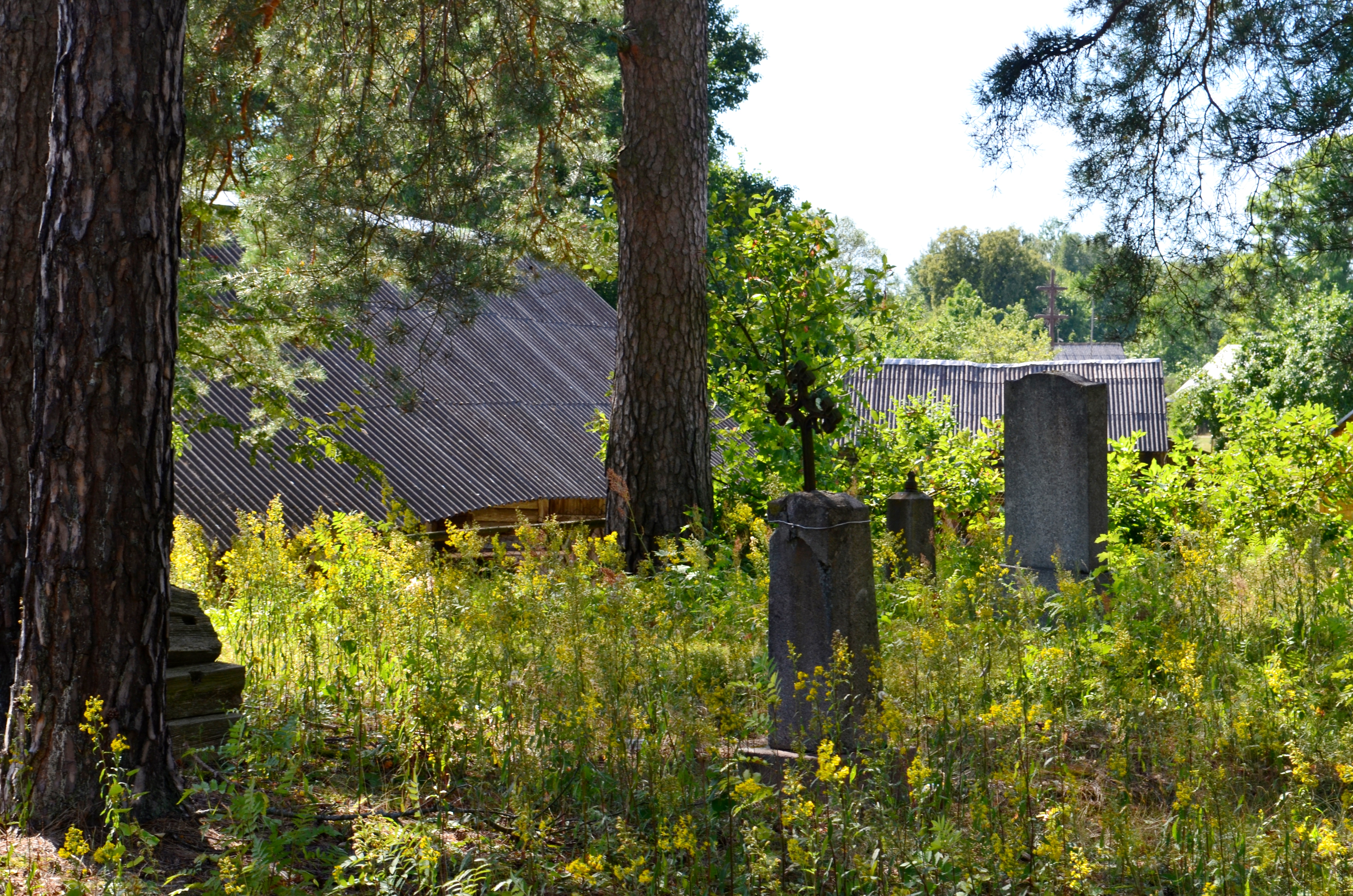 Ašašninkų kapinės, Varėnos r.